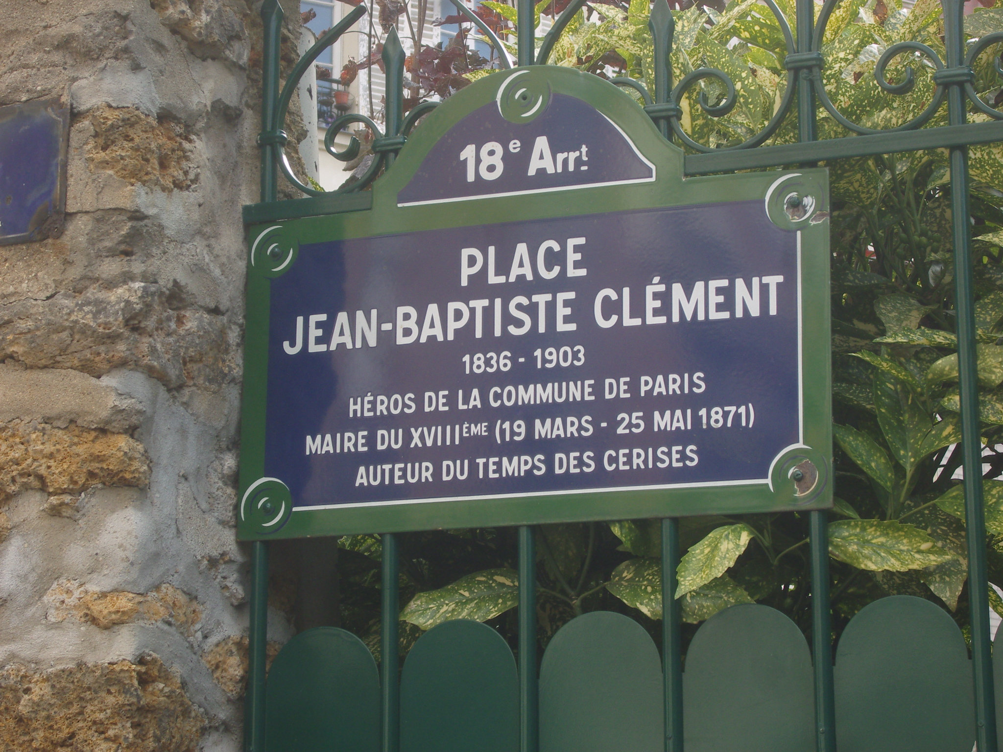 Paris 18e arrondissement - Place Jean-Baptiste-Clément - plaque de rue